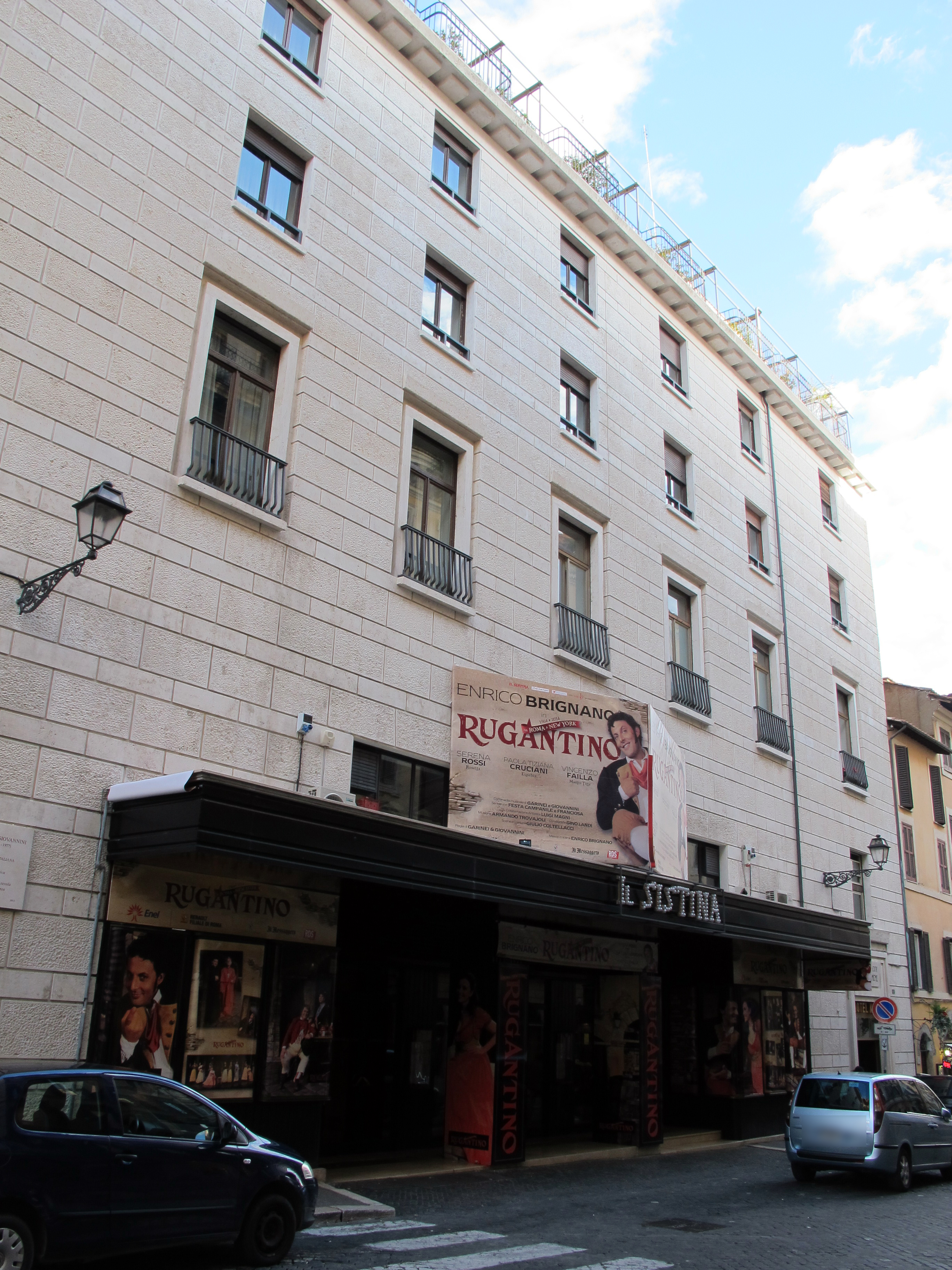 Roma, vedi titolo